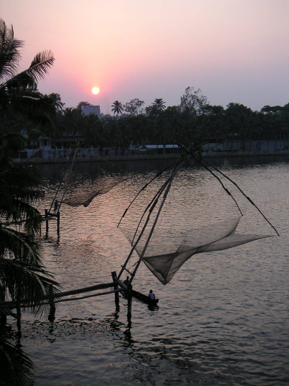 Kollam